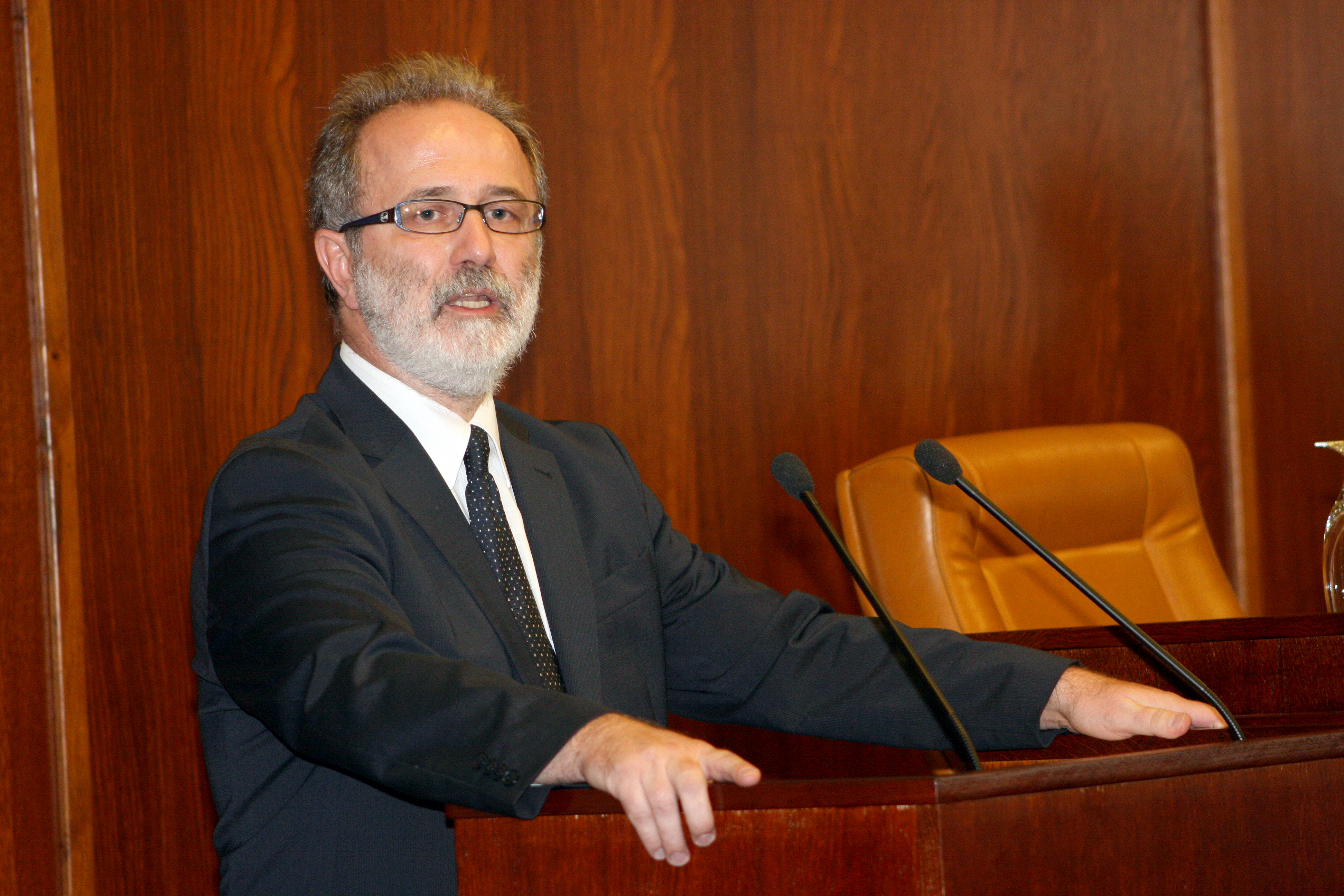 Prof. dr Miroslav Vesković 2010. godine.